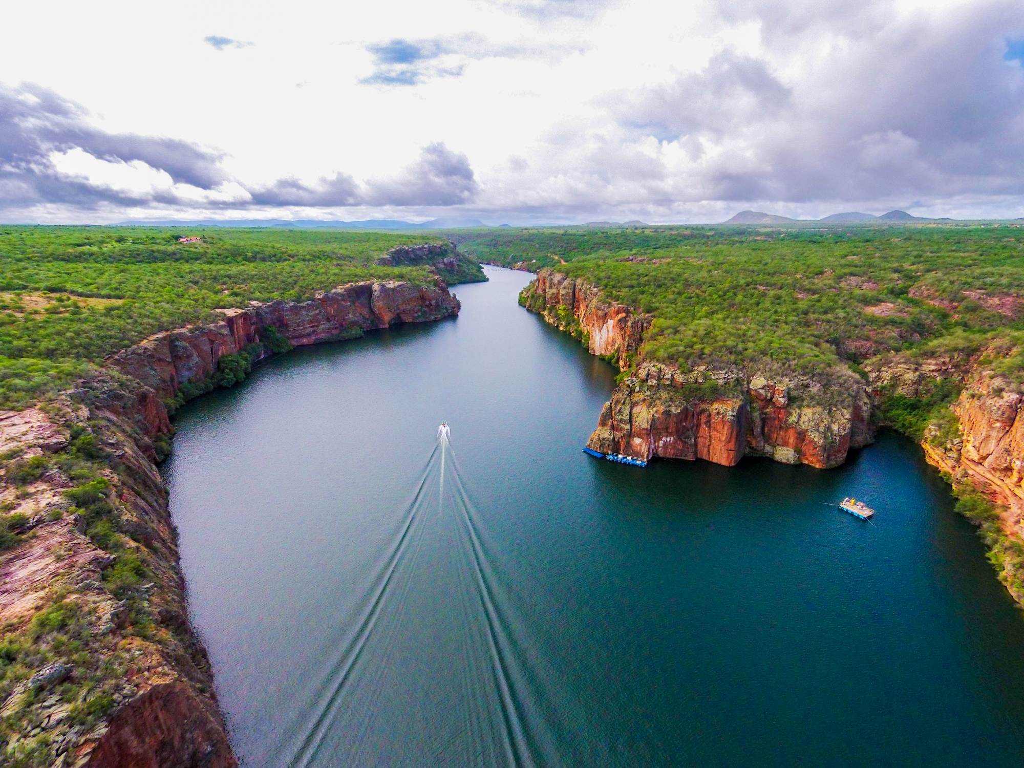 Cânions no Rio São Francisco, na cidade de Canindé de São Francisco, Sergipe. Foto feita por drone